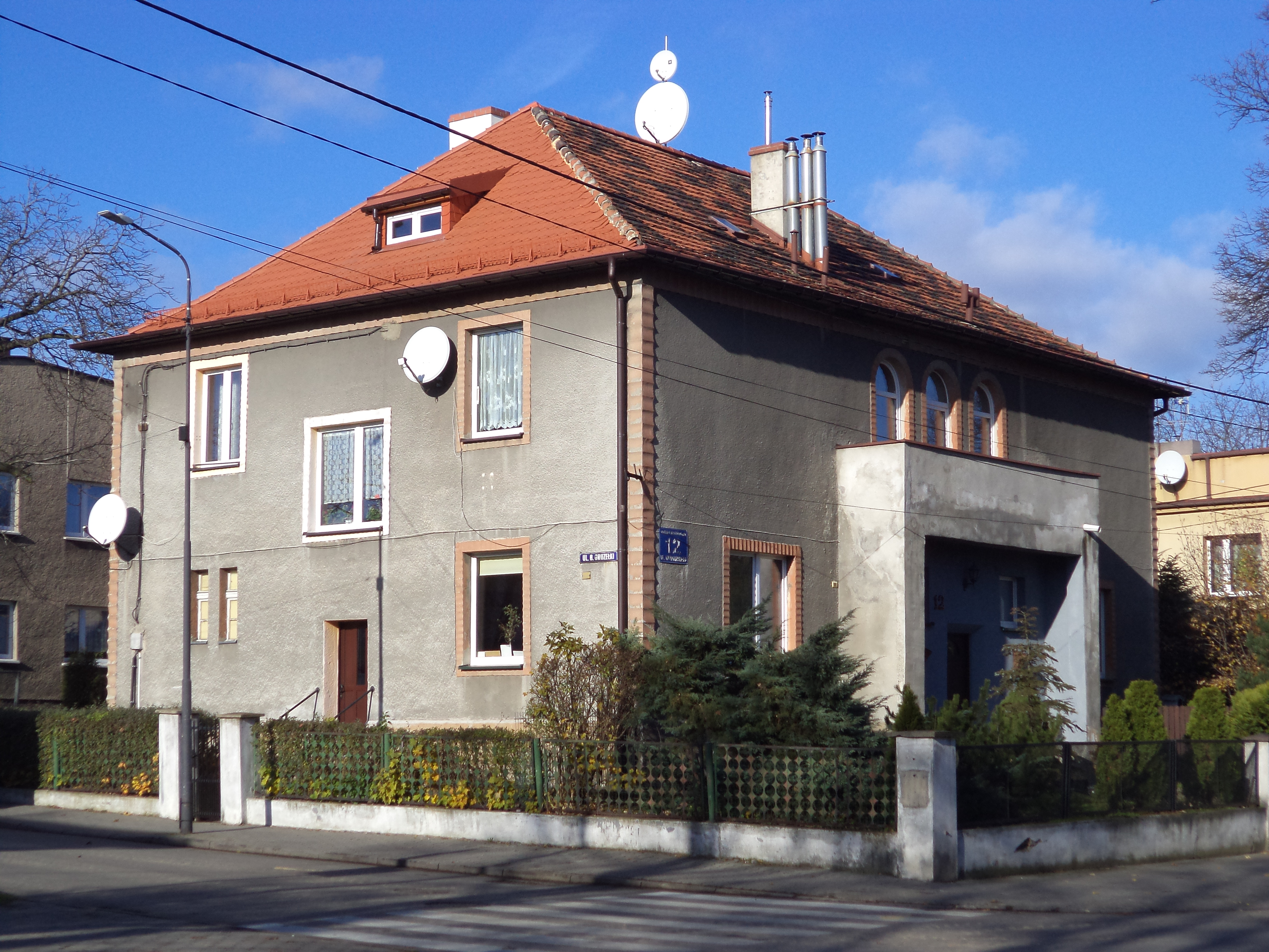 Willa z 1931 roku przy ul. Stanisława Wyspiańskiego 12 w Tarnowskich Górach